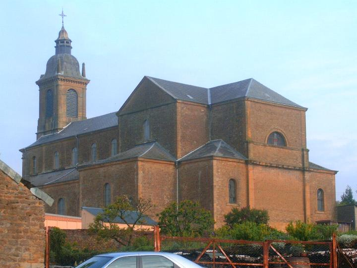 Église Saint Brice de Rimogne